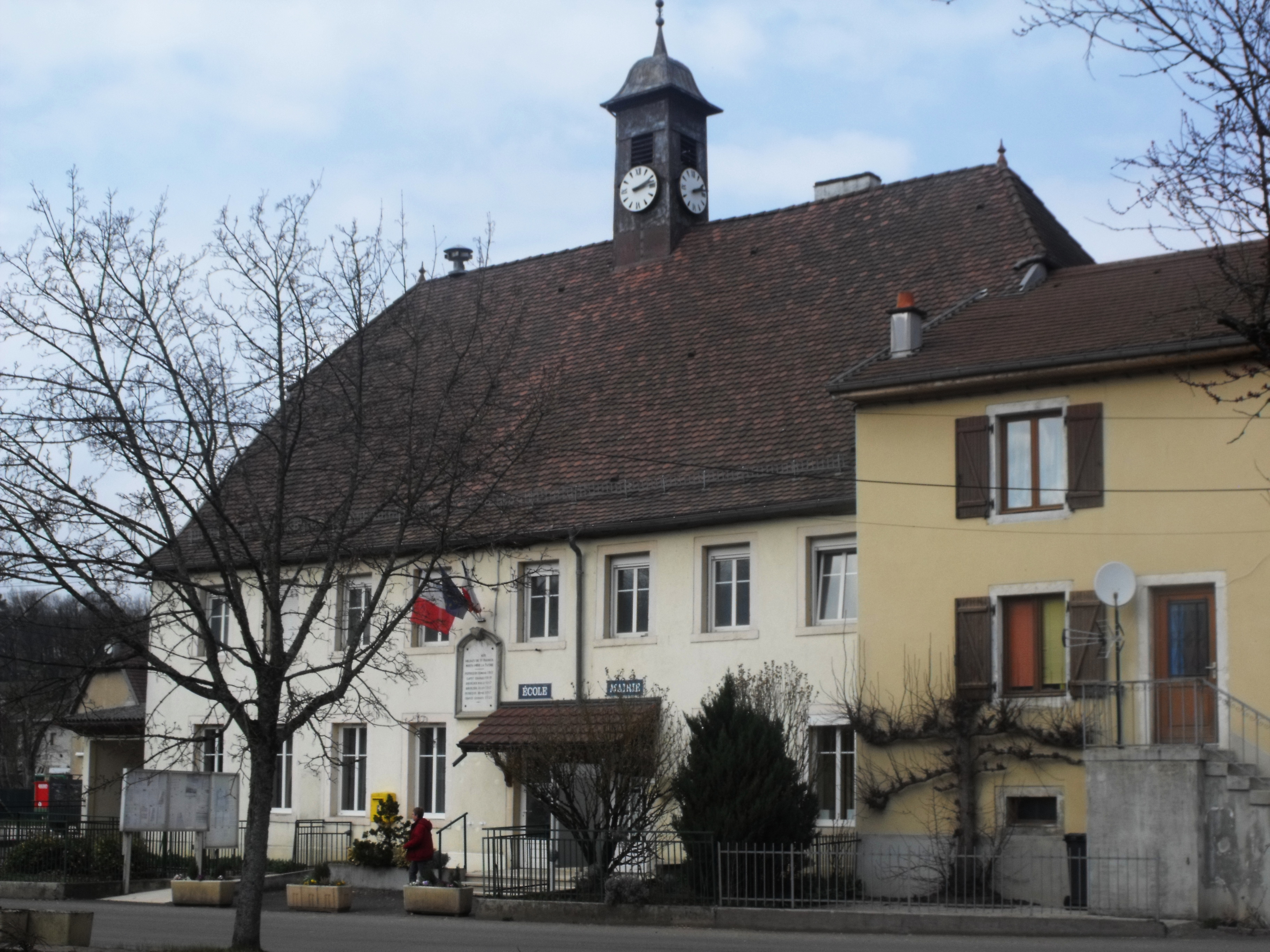 Mairie à Saint Maurice Colombier, Doubs, France